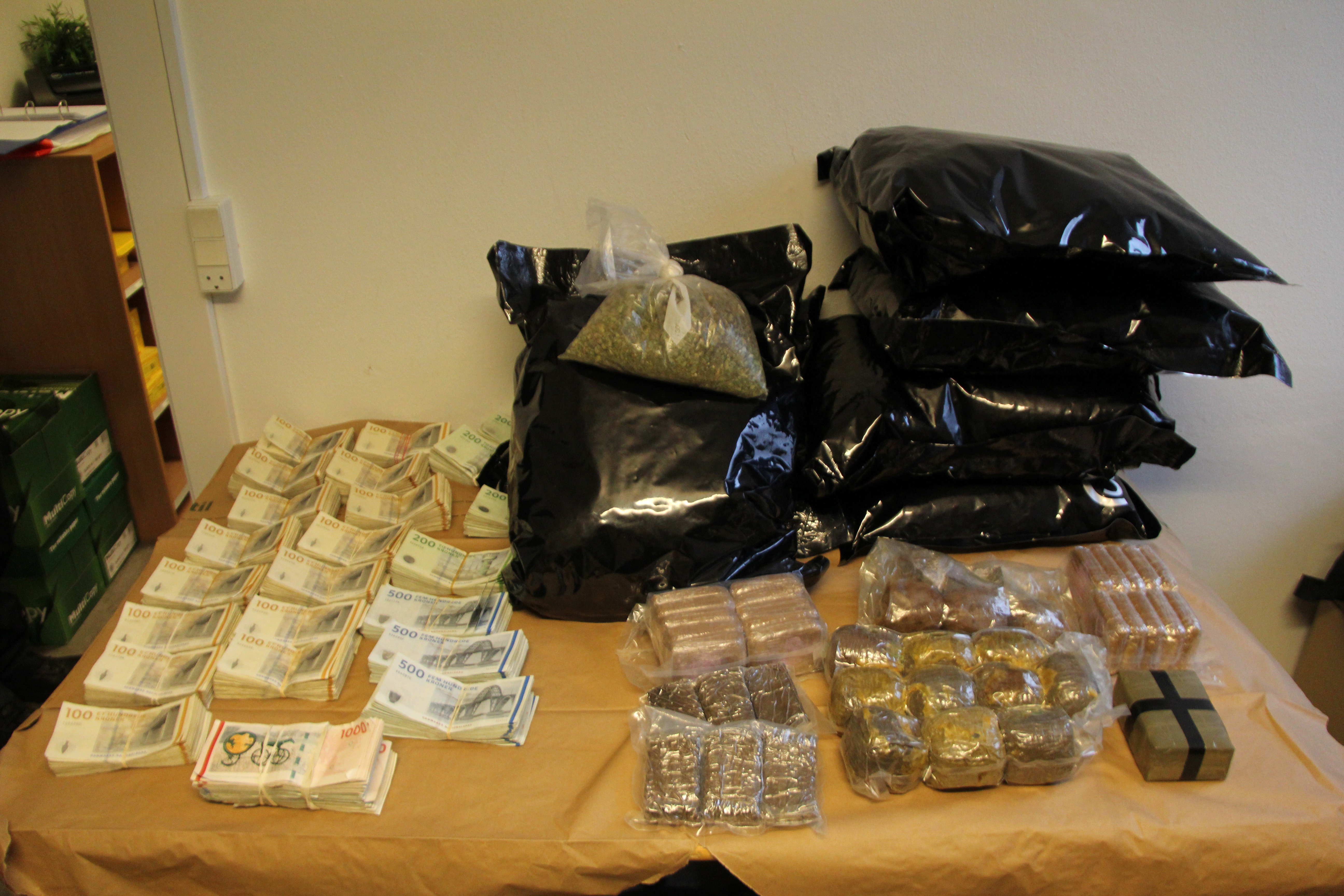 Foto fra Københavns Politis pressemeddelelse "Task Force Pusherstreet beslaglagde lidt over ½ mio. kroner ved aktion i morges" med indledningen "Københavns politis Task Force Pusherstreet gennemførte i dag torsdag den 7. november 2013 i tidsrummet kl. 06:40 - 08:18 en ransagningsaktion flere steder i ”Fredens Ark” på Christiania."